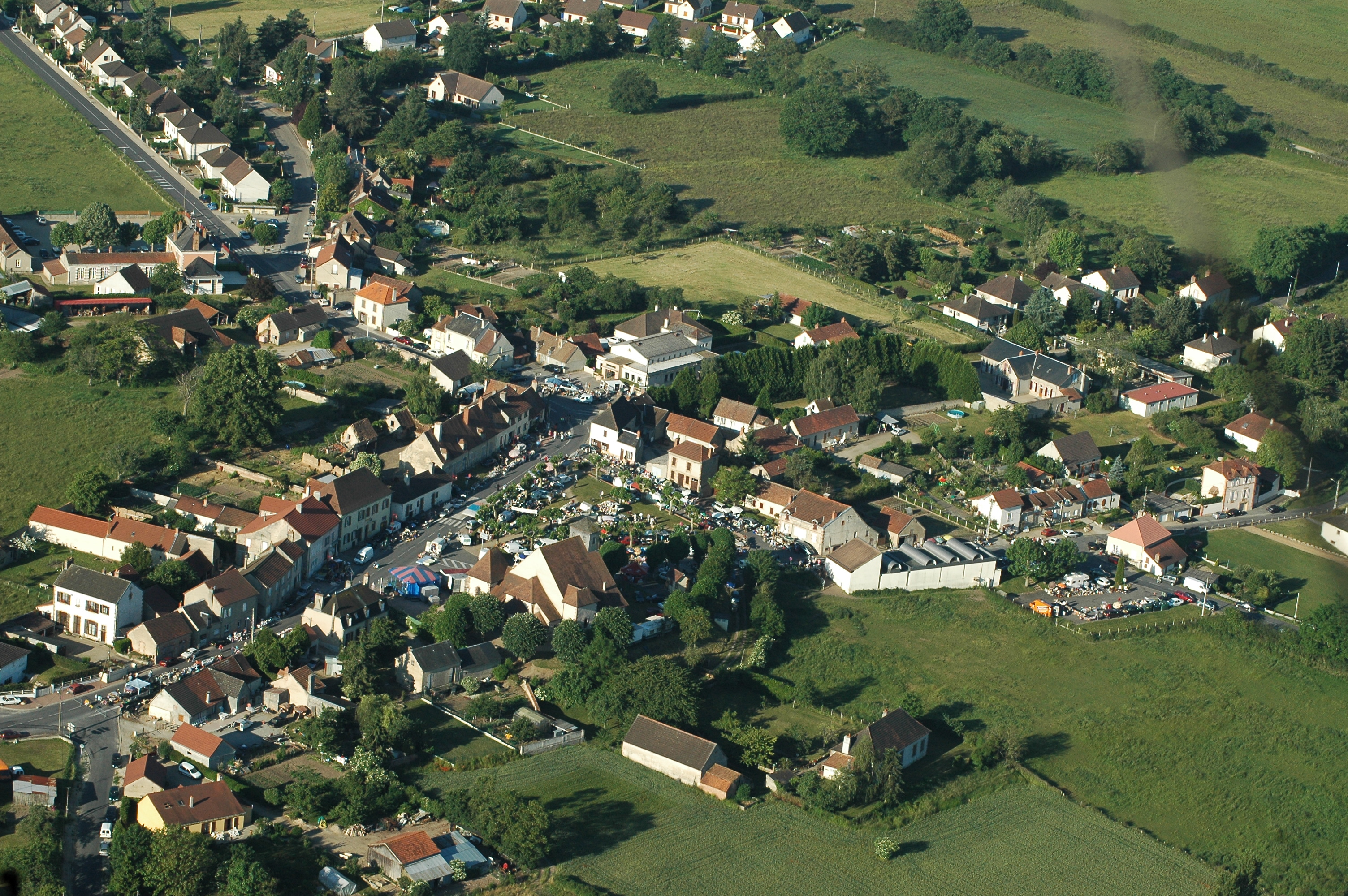 Vue aérienne de Trévol, Allier, France.